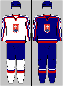 Slovak national team jerseys from World Championship 2005